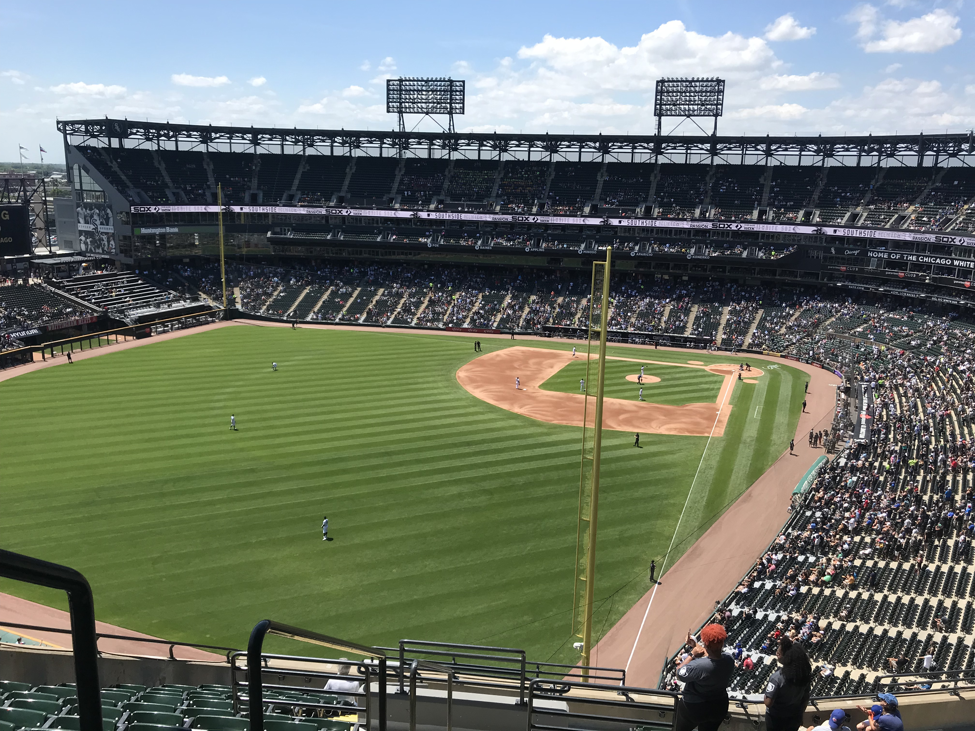 Guaranteed Rate Field White Sox vs NY Mets